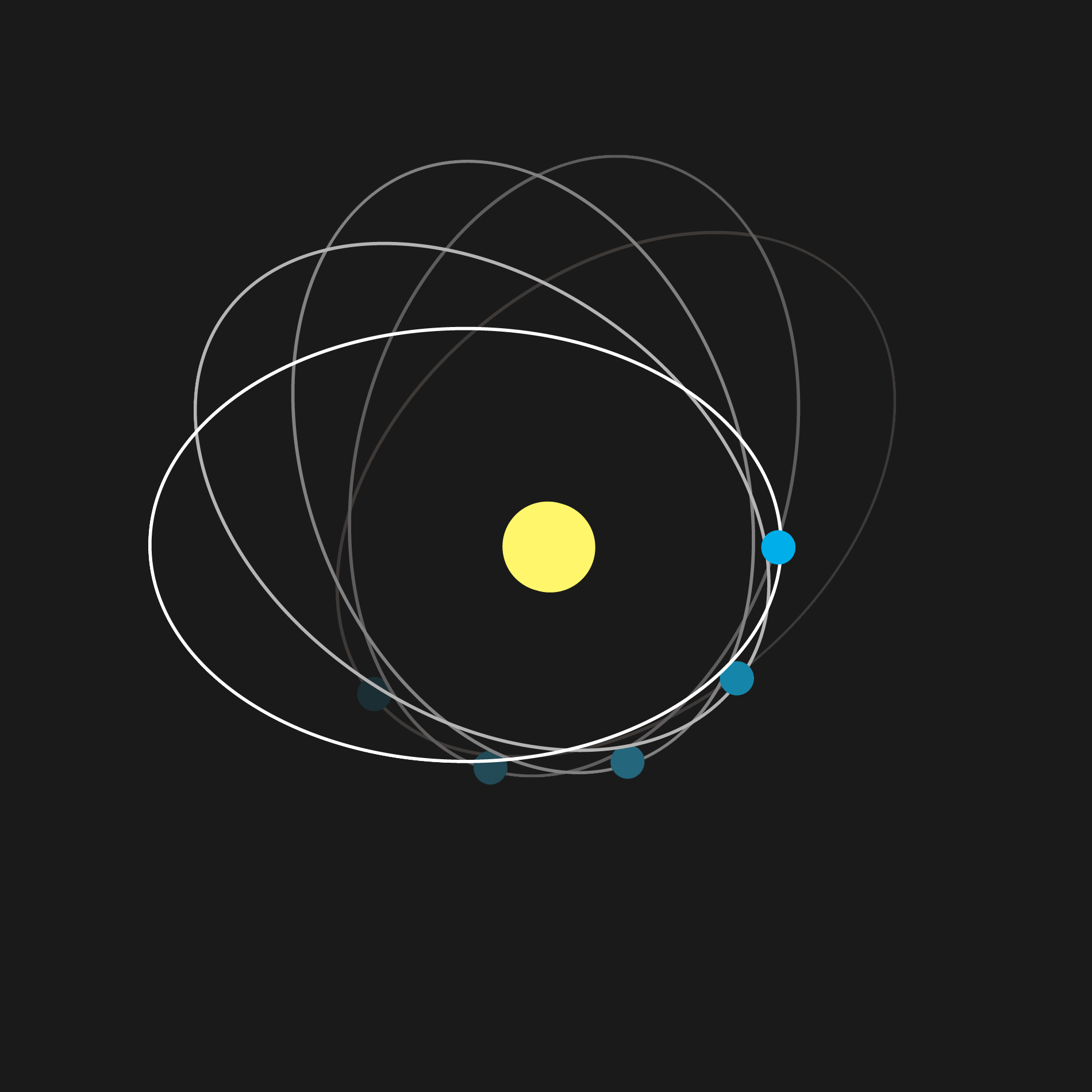 Apsiden- oder Periheldrehung.